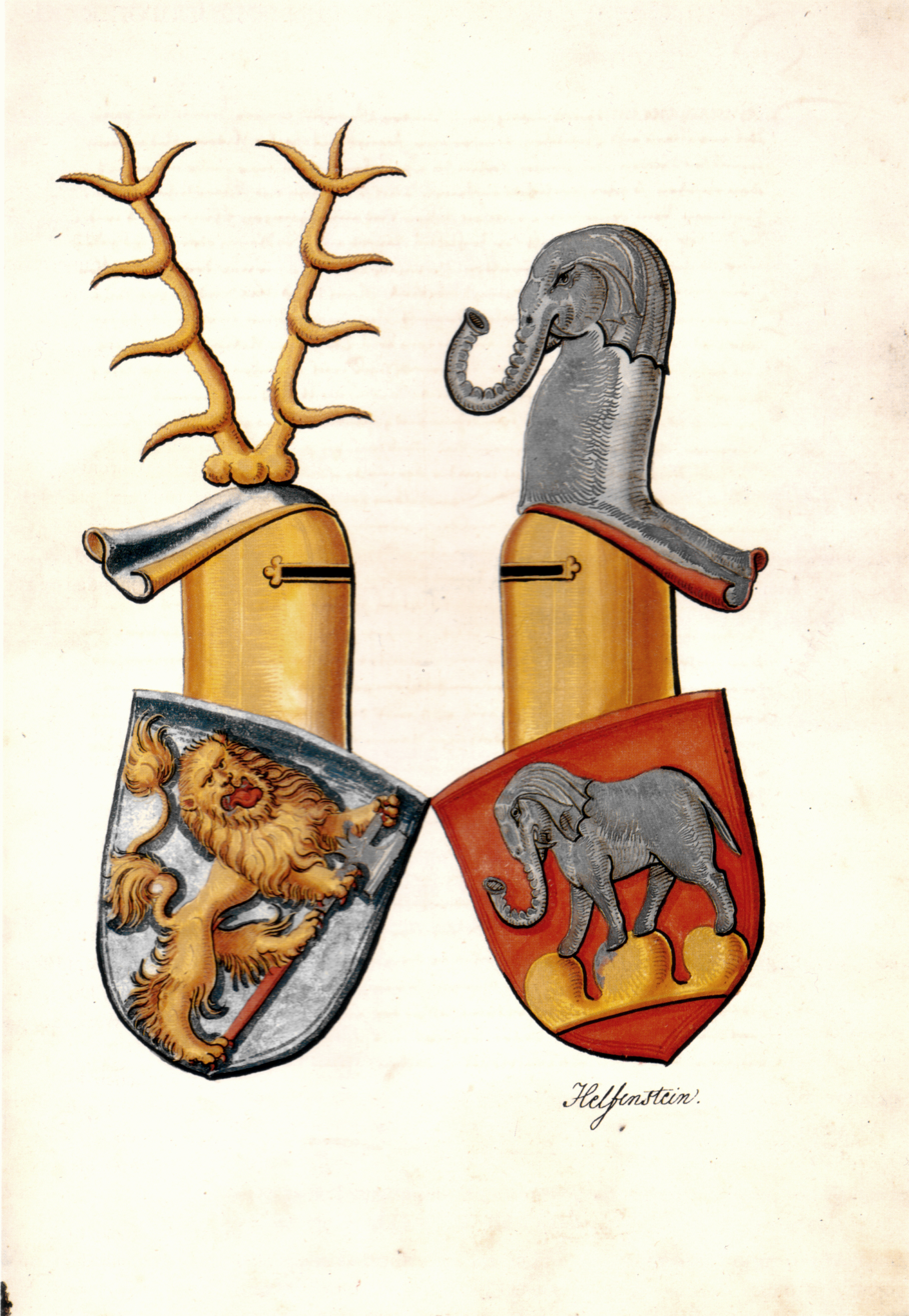 Froben Christoph von Zimmern: Zimmerische Chronik (1. Band der Reinschrift), Meßkirch 1566, Papier, 407 Bl., 39 x 28 cm Württembergische Landesbibliothek Stuttgart, Cod. Don. 580a Abbildung: Seite 33 der Handschrift, Zeichnung wohl aus einer Nachfolgewerkstatt des Meisters von Meßkirch